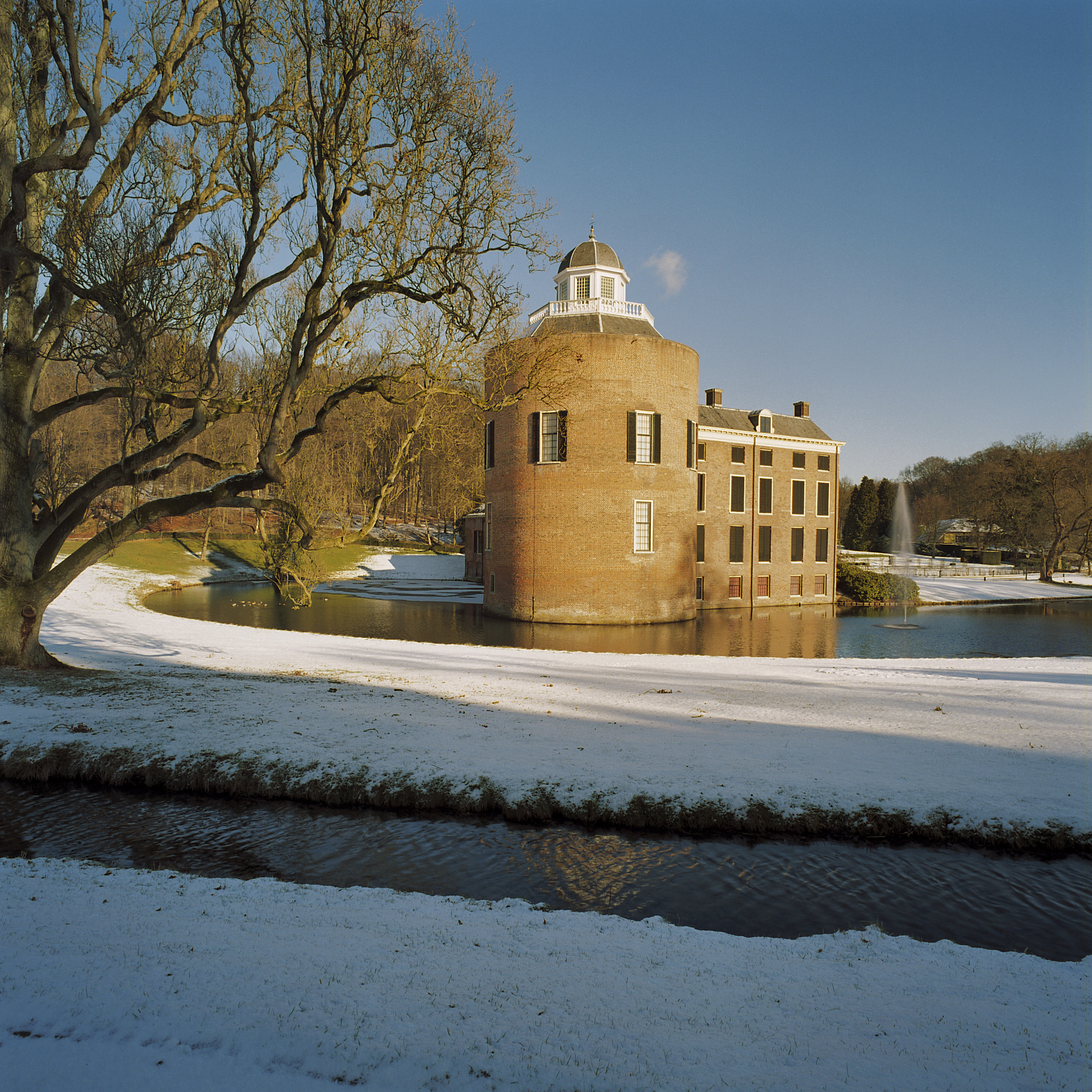 Theekoepel van kasteel Rosendael: Achterzijde kasteel, donjon